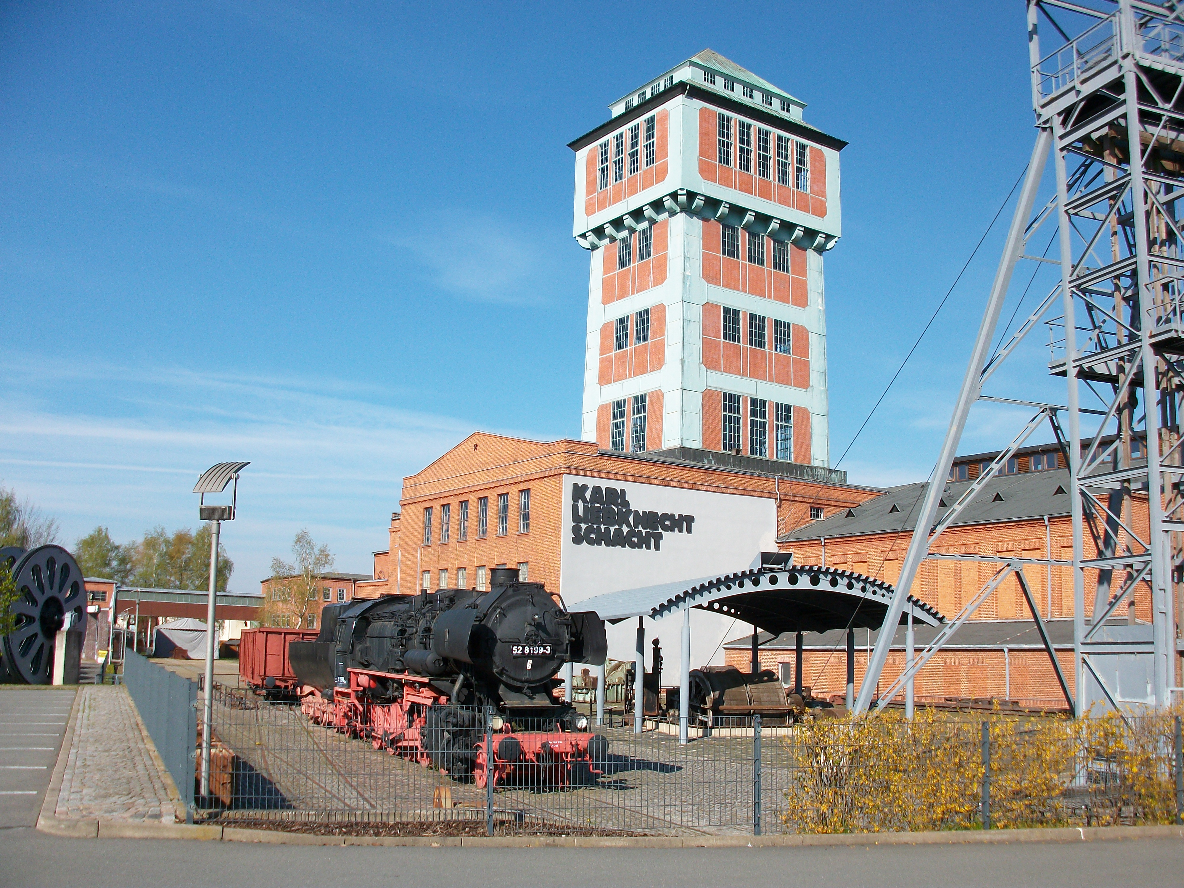 Oelsnitz, Bergbaumuseum mit Dampflok (2016)